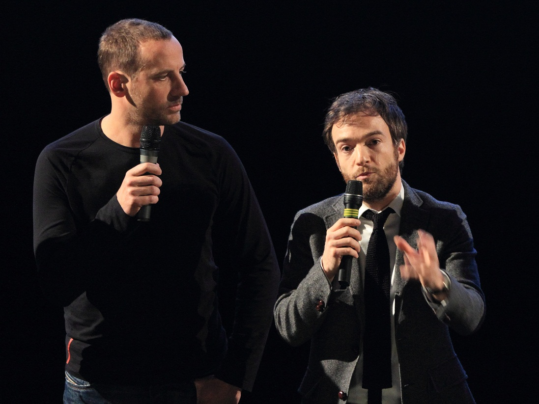 Fred Testot et Jonathan Lambert lors de l'avant première de "Dépression et des potes" le 26 avril 2012 à Paris, France.